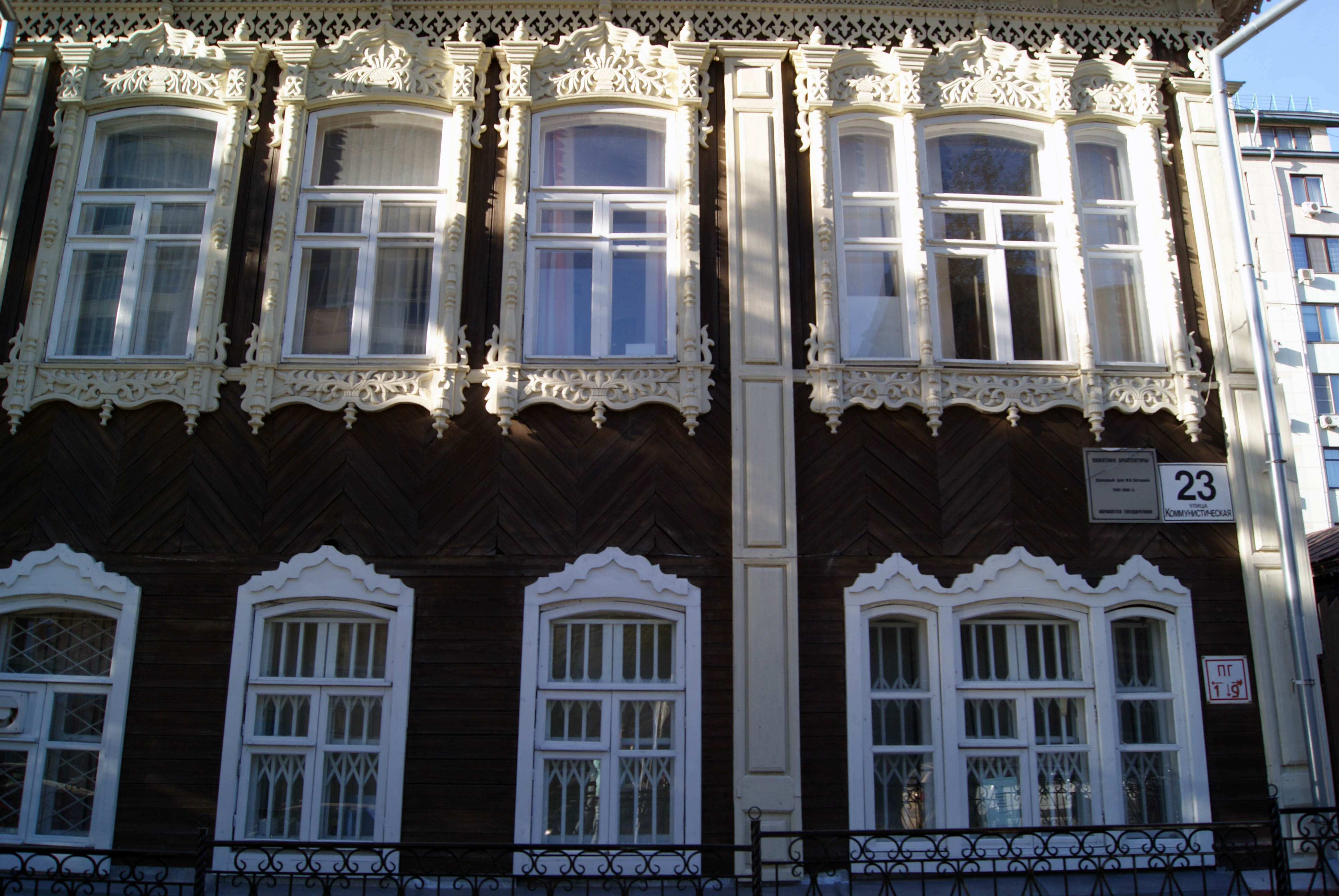 Жилой дом двухэтажный (Новосибирская область, Новосибирск, Коммунистическая улица, 23)